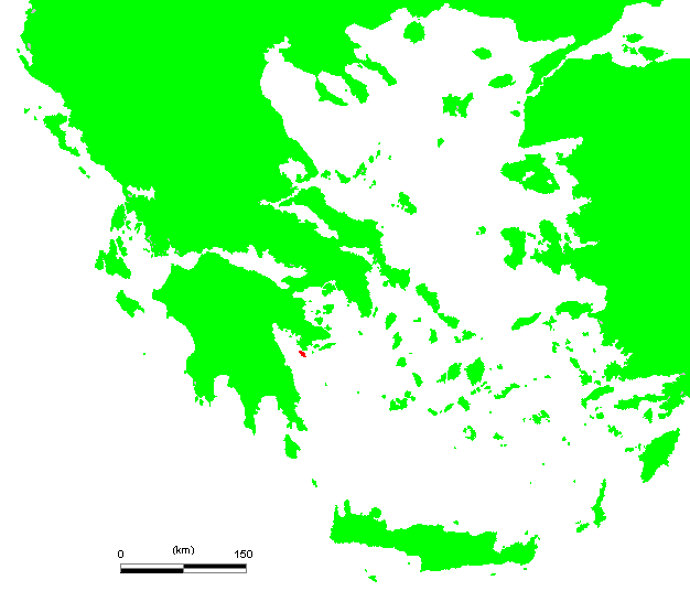 GR Spetses.PNG (Greek island)